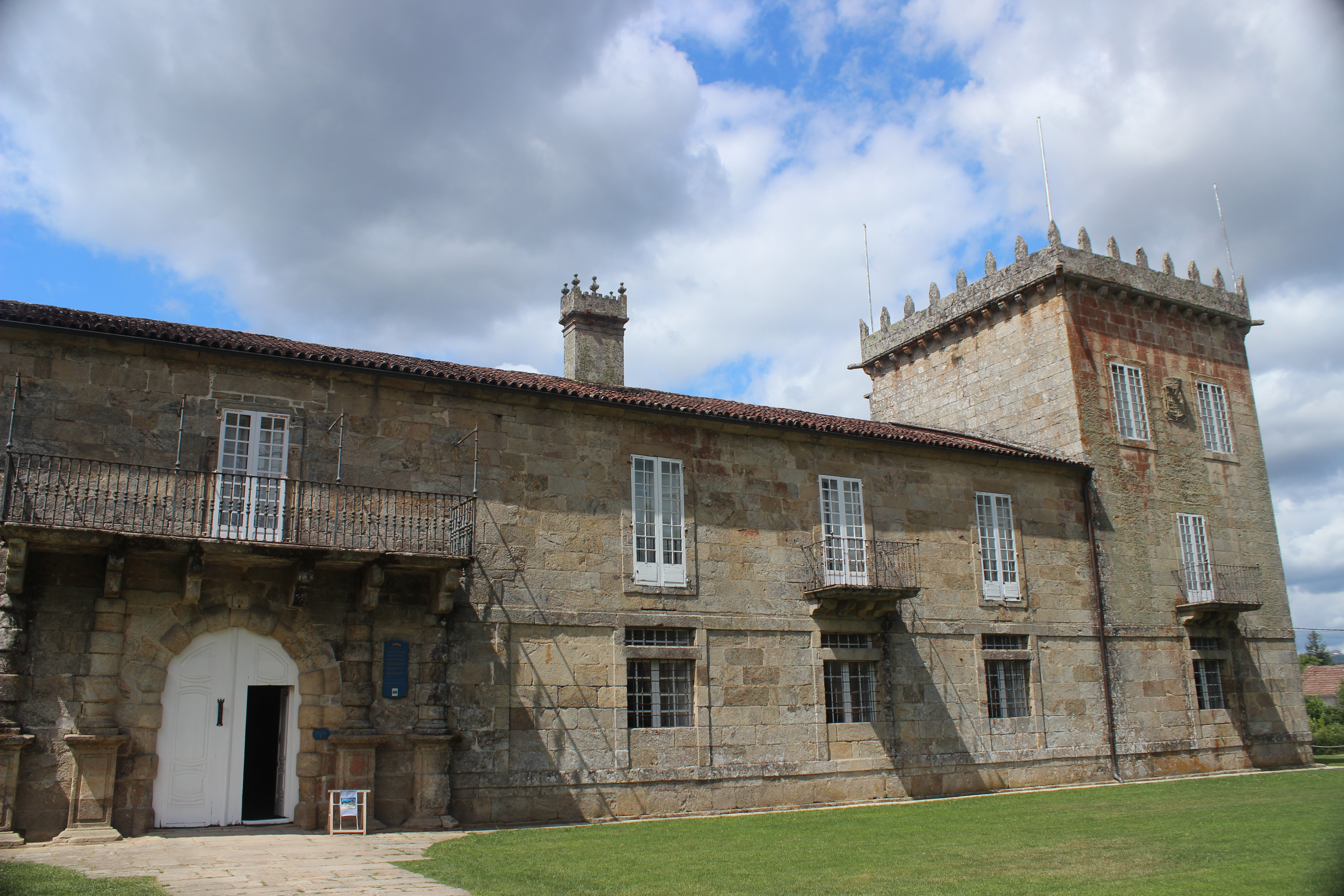 Pazo de Oca. A Estrada (Pontevedra).